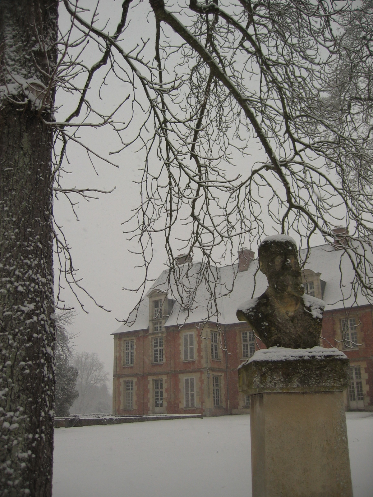 Le parc de l'Institut national agronomique à Thiverval-Grignon, sous la neige, avec le château de Grignon et un buste en ligne de mire.